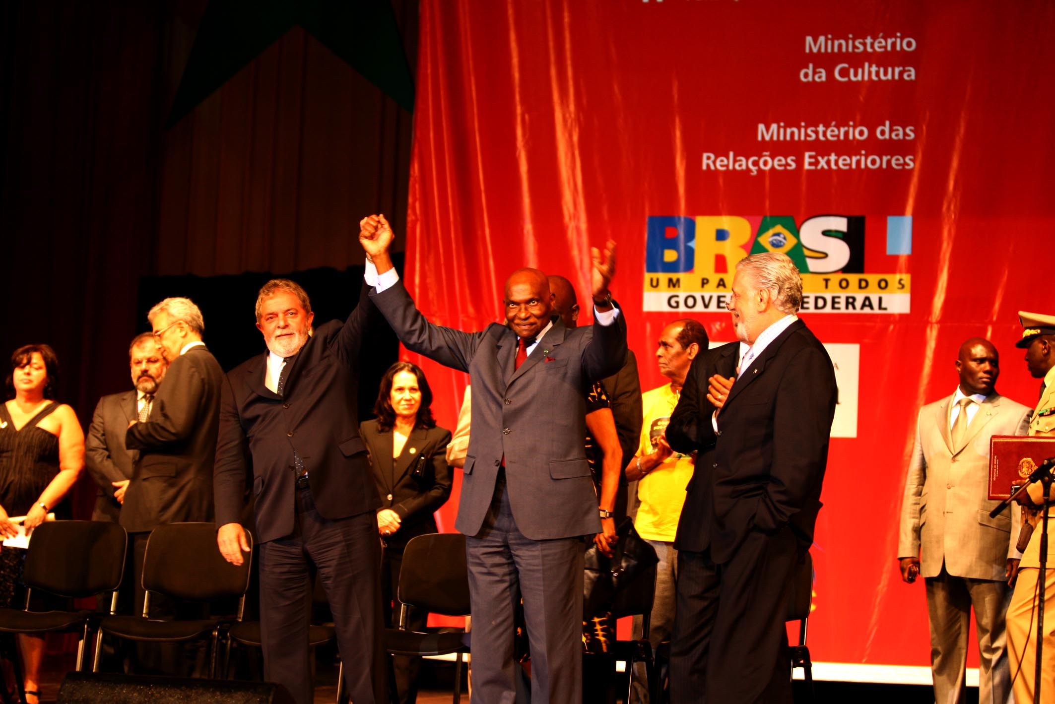 Governador Jaques Wagner o Presidente Lula e o Presidente do Senegal participam do lançamento do III FESMAN Festival de Música e Arte Negra no Brasil Foto Manu Dias/AGECOM